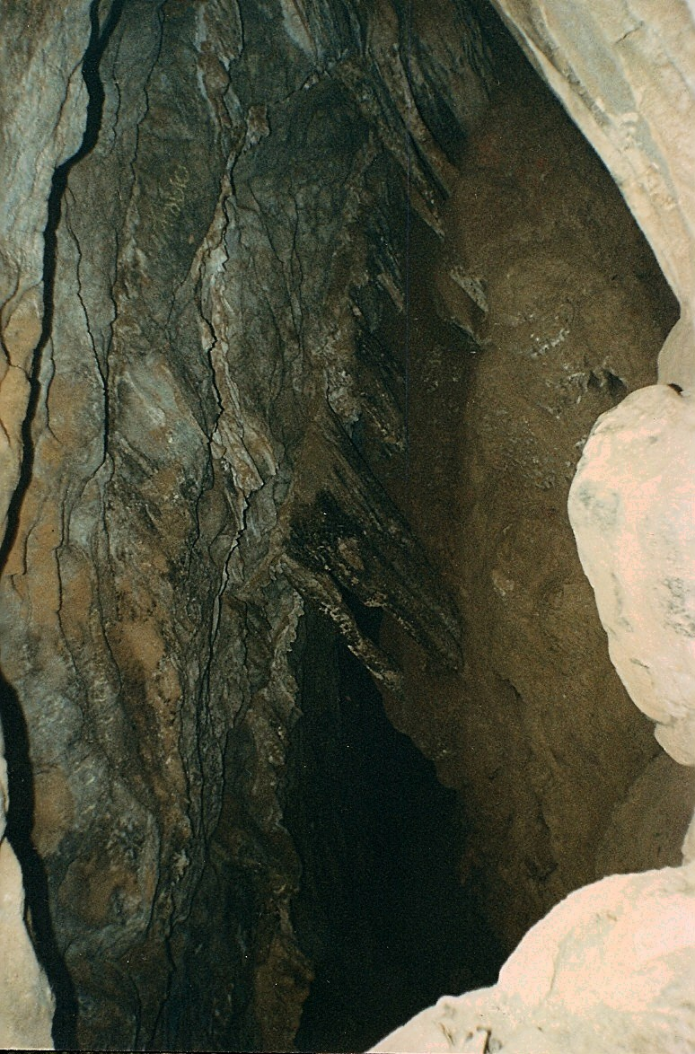 Parque Recreacional Cuevas del Indio, ubicado en el municipio El Hatillo del estado Miranda. El Parque fue establecido el 18 de abril de 1983, por el Decreto Nº 1.969, con la finalidad de proteger el ecosistema presente y formaciones rocosas, áreas que fueran asiento de pobladores indígenas del pueblo Los Mariches. Tiene 37,7 hectáreas de superficie.Su atractivo especial son 22 cuevas, entre las cuales destacan por su tamaño la Cueva del Indio, la Cueva del Pío y El Verraco. Entre sus otros atractivos están la quebrada La Guairita, las ruinas coloniales y el sector Horno de Cal.